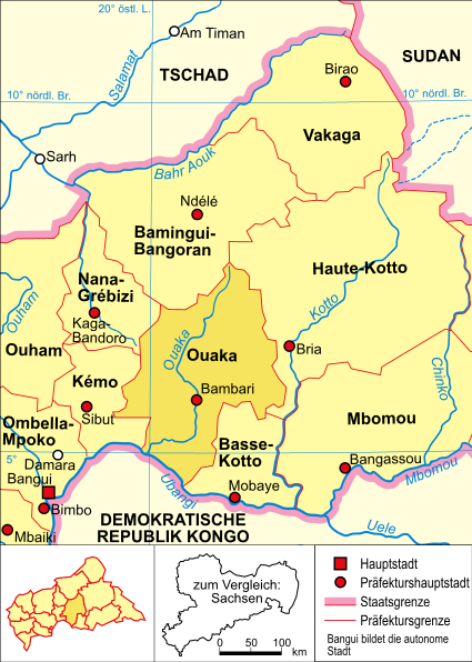 Bildbeschreibung: politische Karte der Zentralafrikanischen Republik (Präfektur Ouaka hervorgehoben) Zeichner: Domenico-de-ga Datum: 11. Dezember 2005